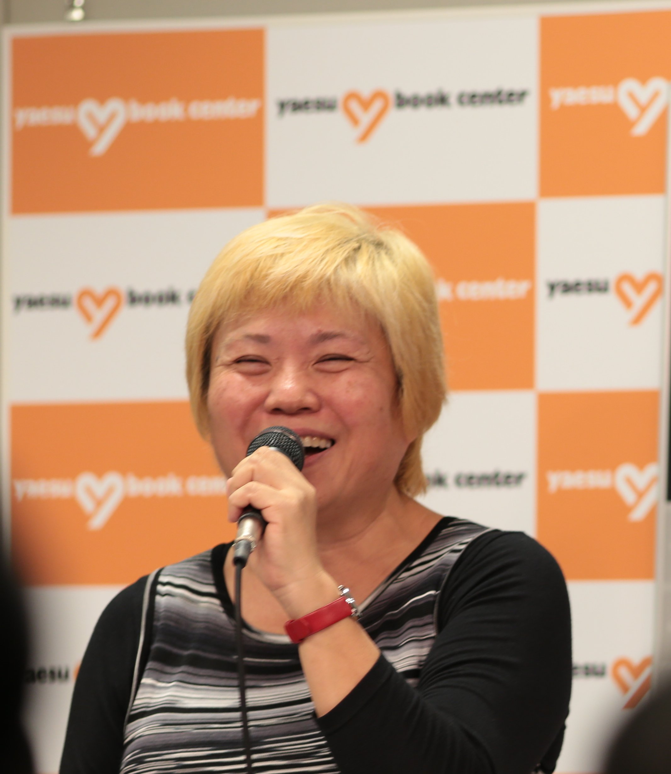 青山千春博士の写真